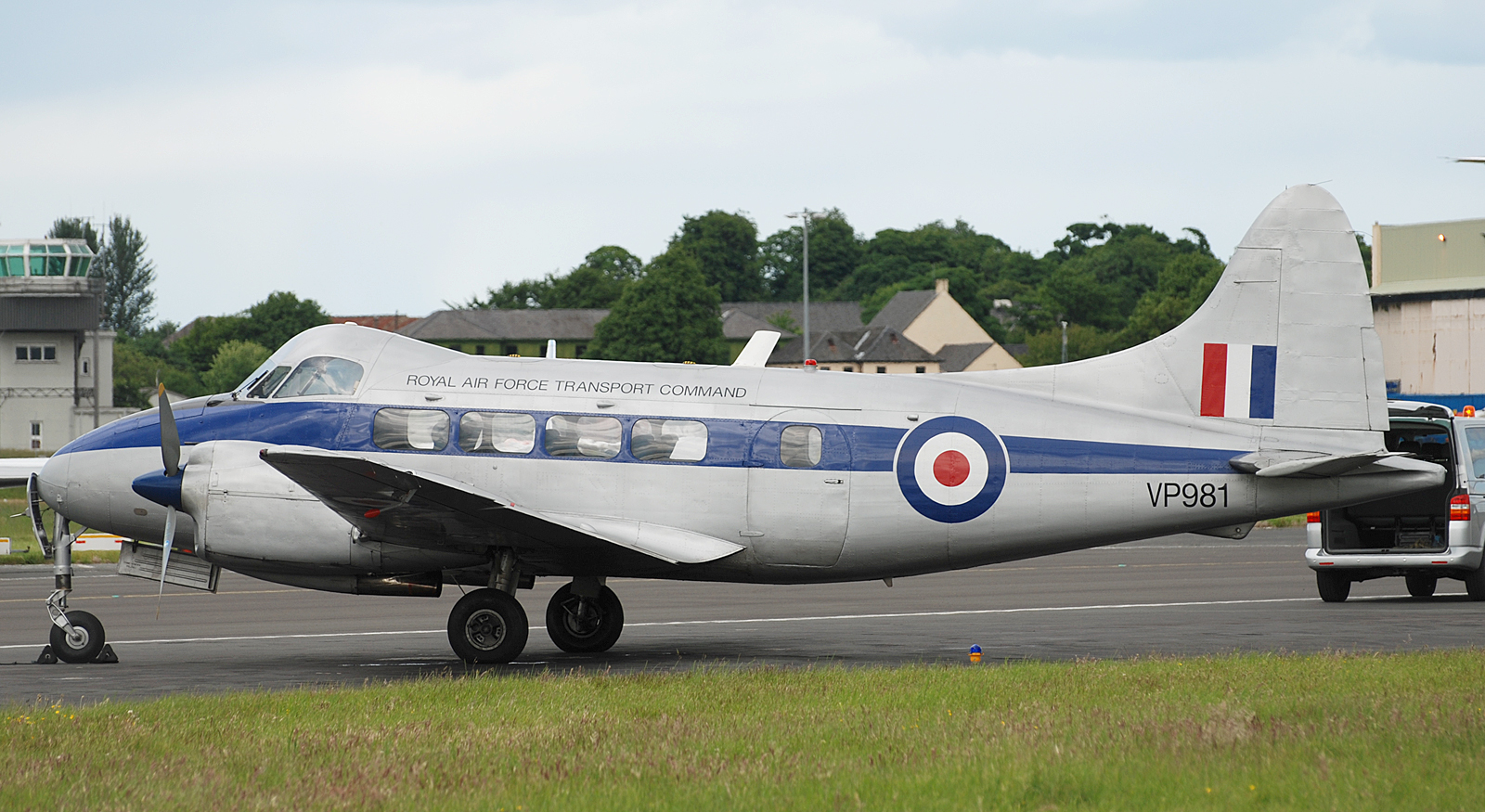 de Havilland DH.104 Dove 8 della Royal Air Force